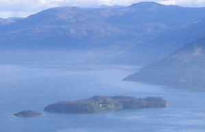 Kvamsøy i Hardanger